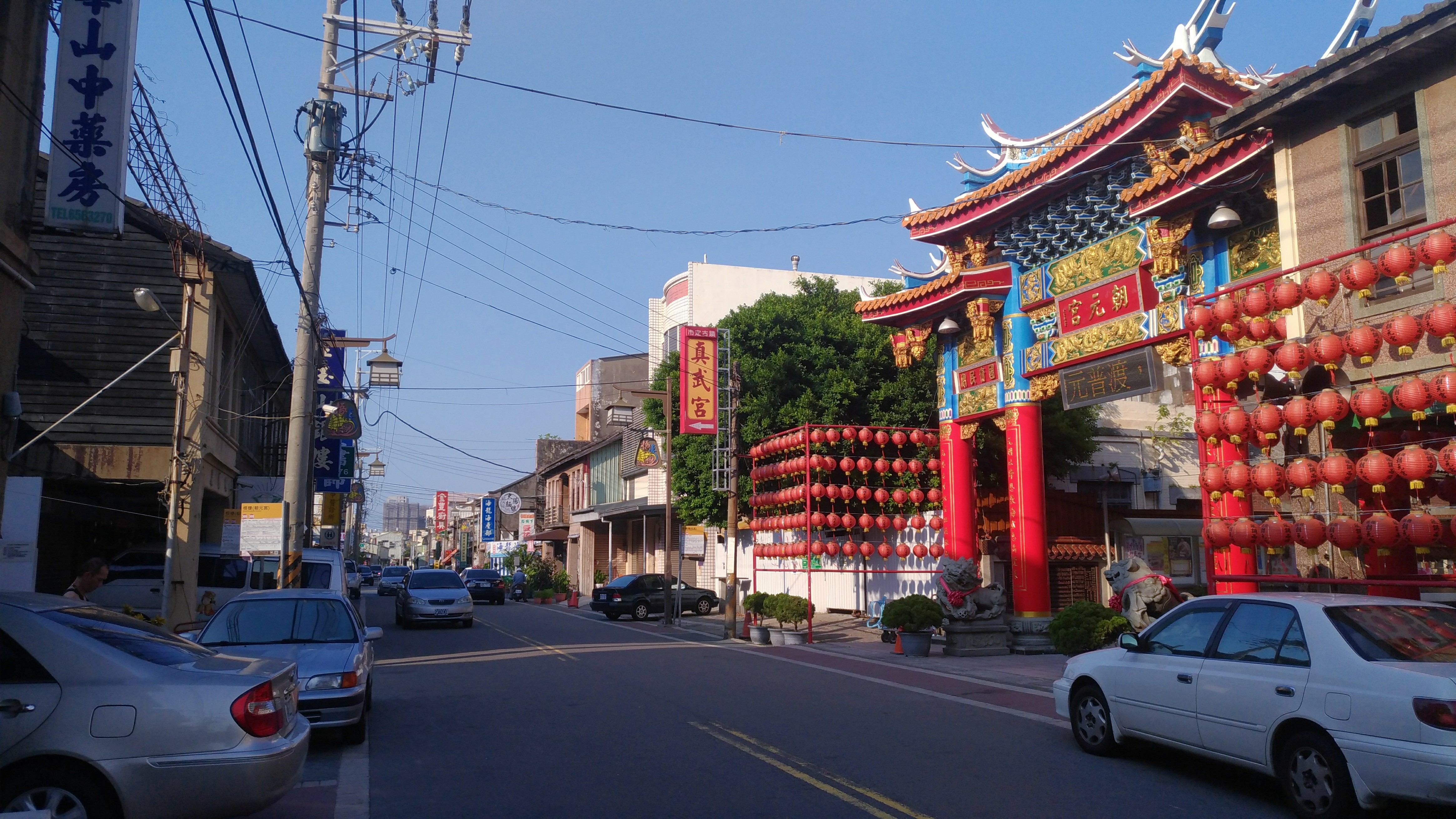 中文（台灣）: 梧棲老街街景